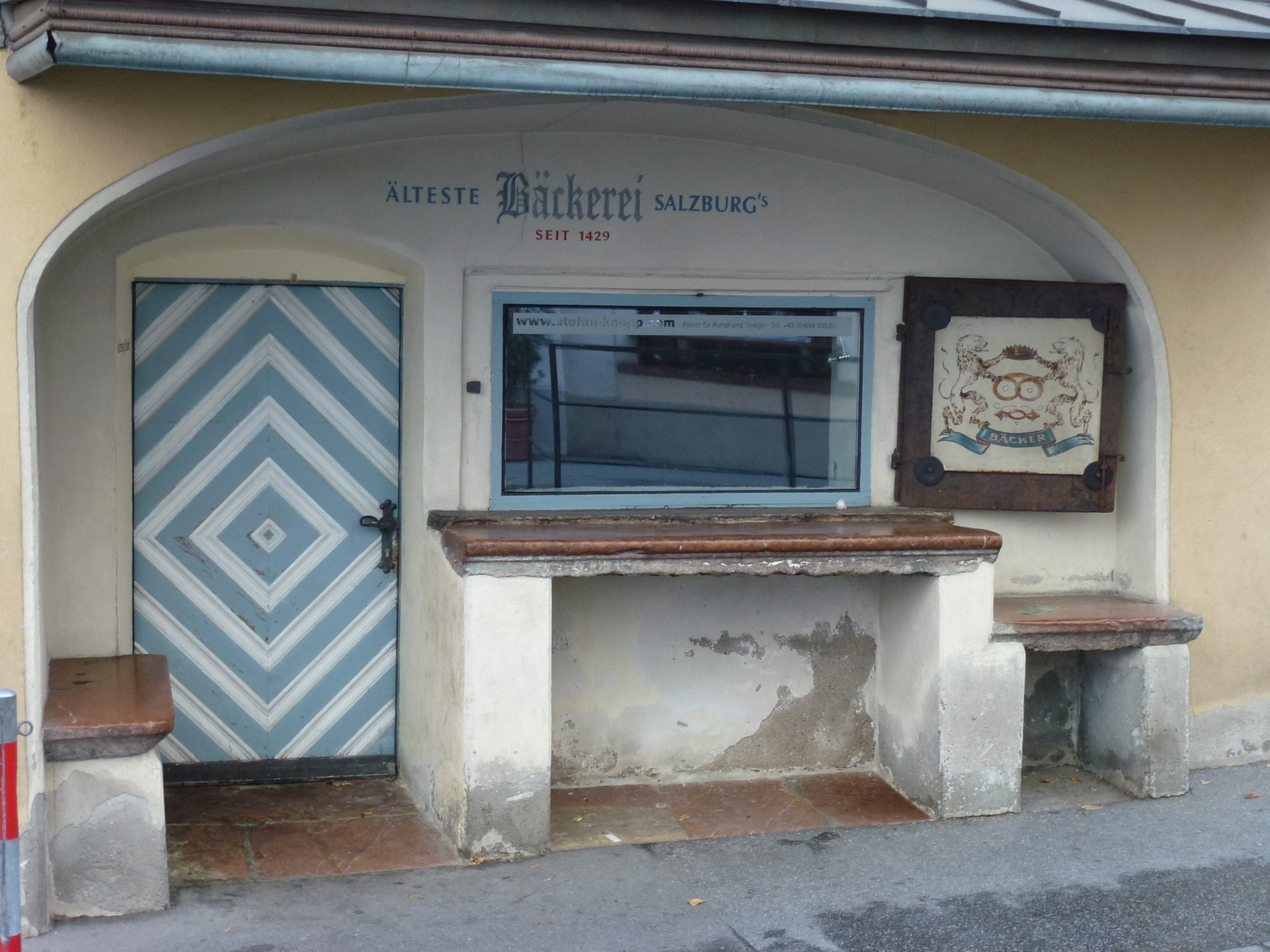 Wohn- und Geschäftshaus, Älteste Bäckerei Salzburgs